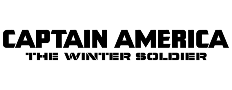 Logo de la película de 2014 Captain America: The Winter Soldier.